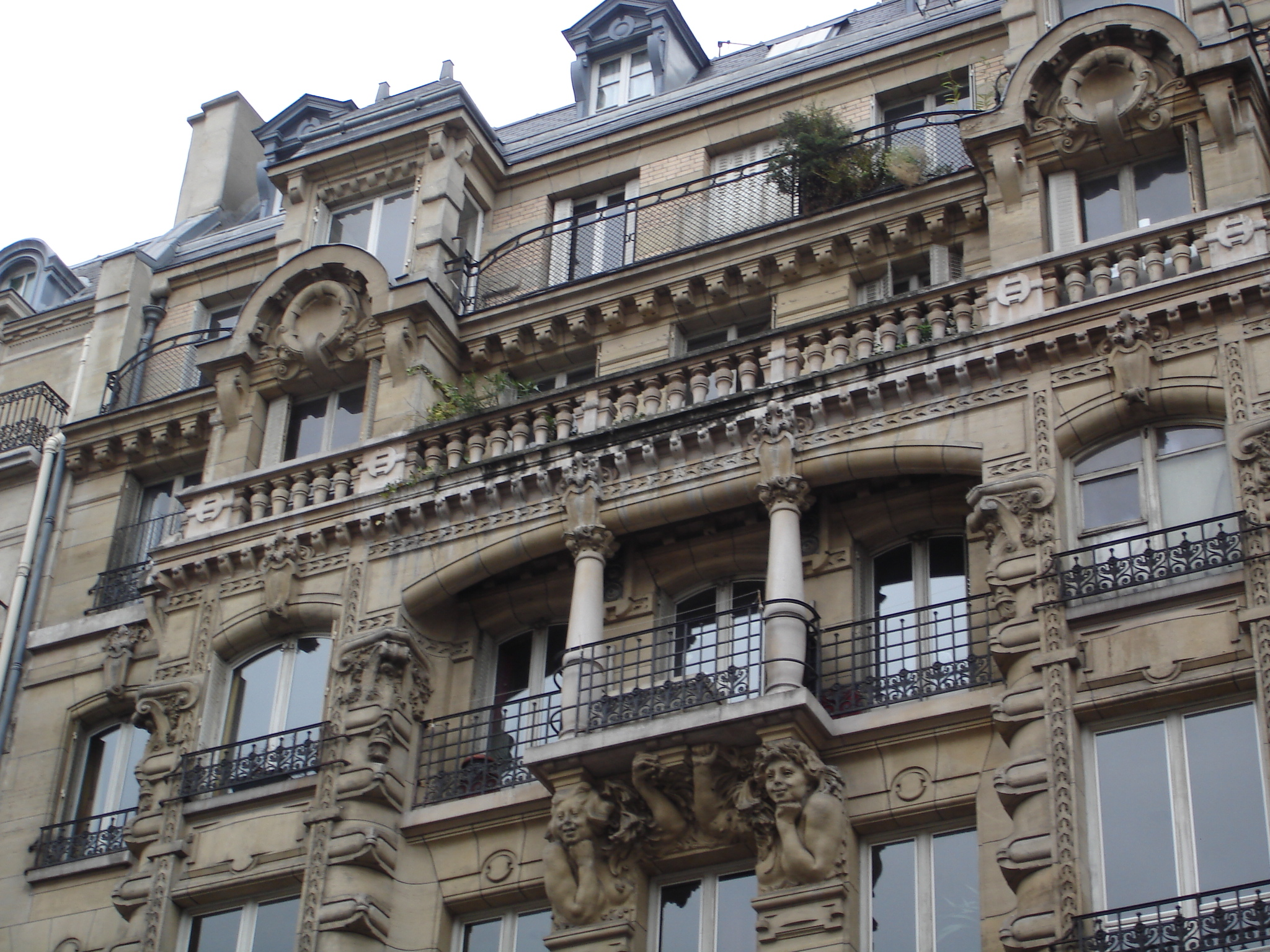 Apartment block: 39 rue Réaumur (Paris) - general view - details